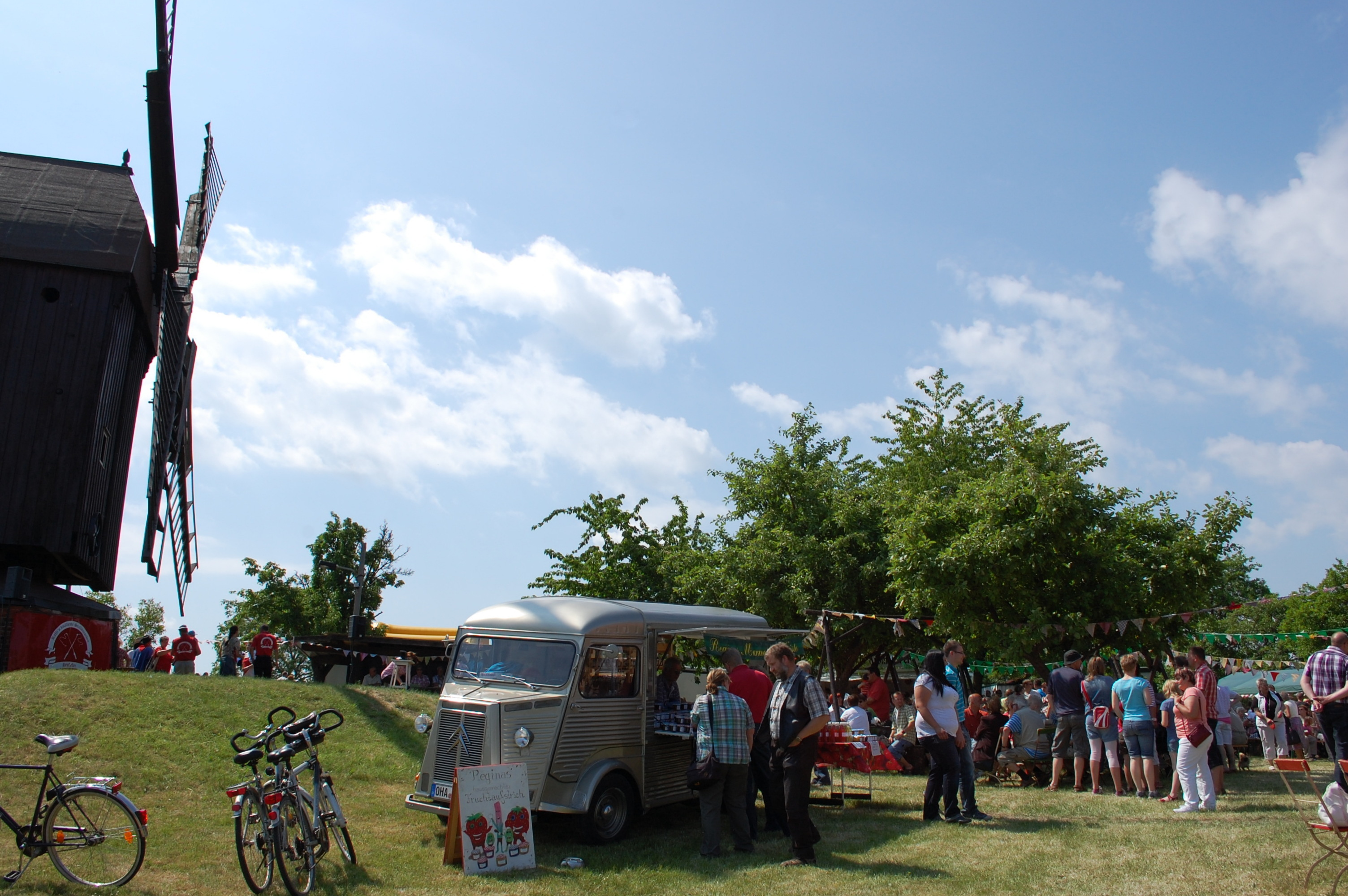 Windmühlenfest 2012